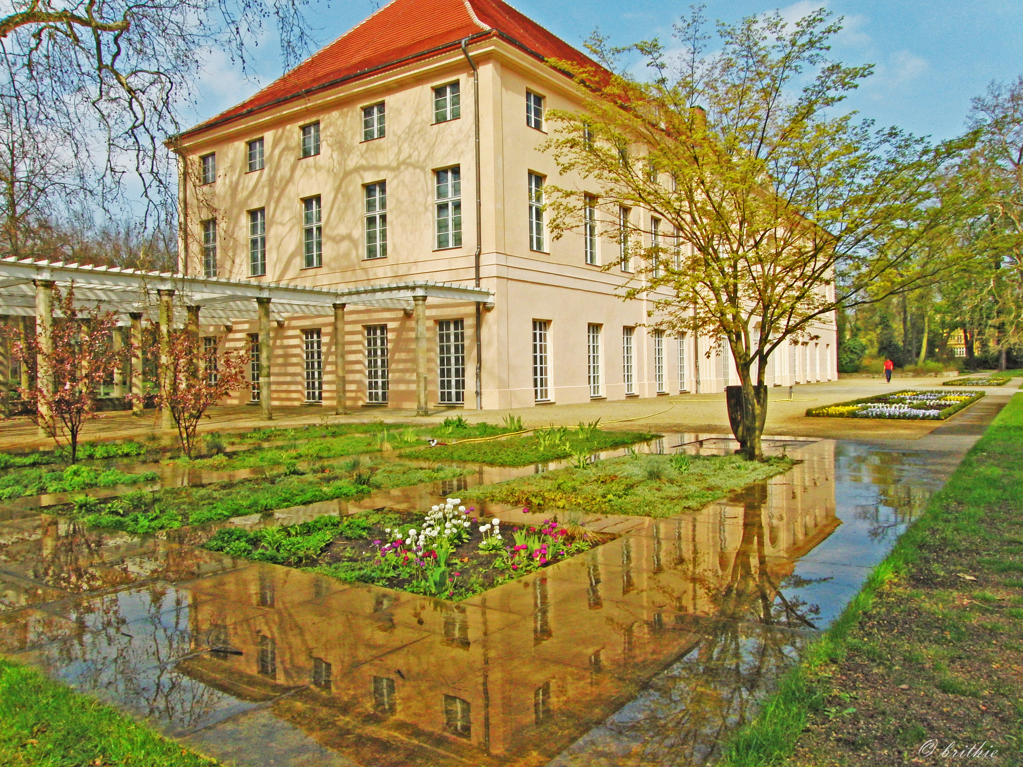 Barockschloß im Ortsteil Niederschönhausen des Berliner Bezirks Pankow